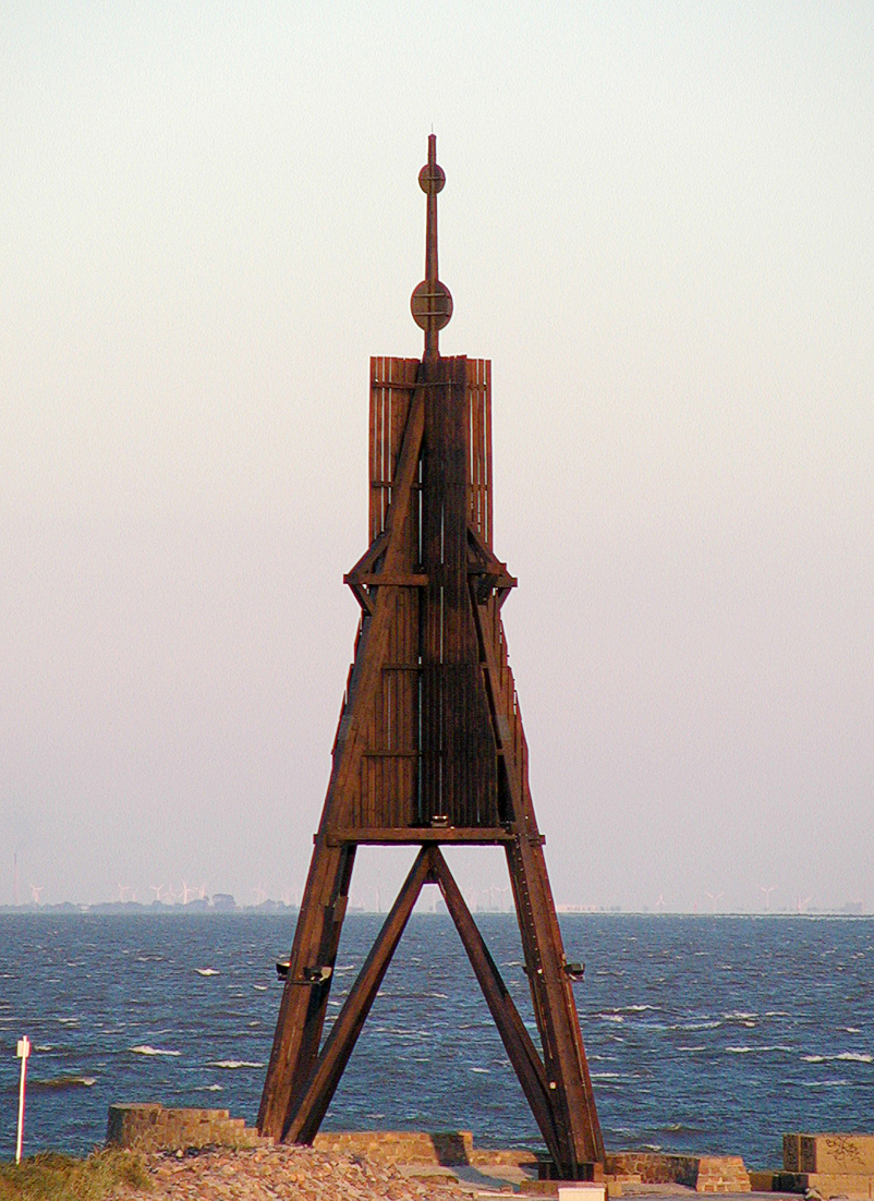 Die Kugelbake am Abend